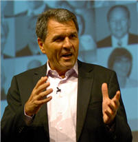 ClausHeinrichHRConf2007